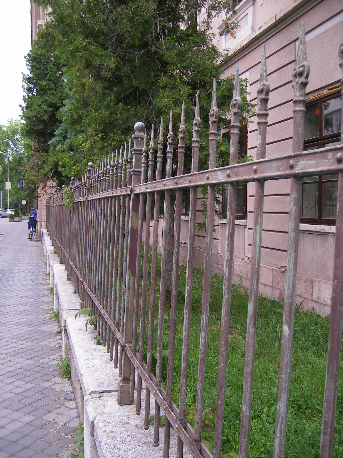 Komárom - régi vármegyeháza - kovácsoltvas-kerítés